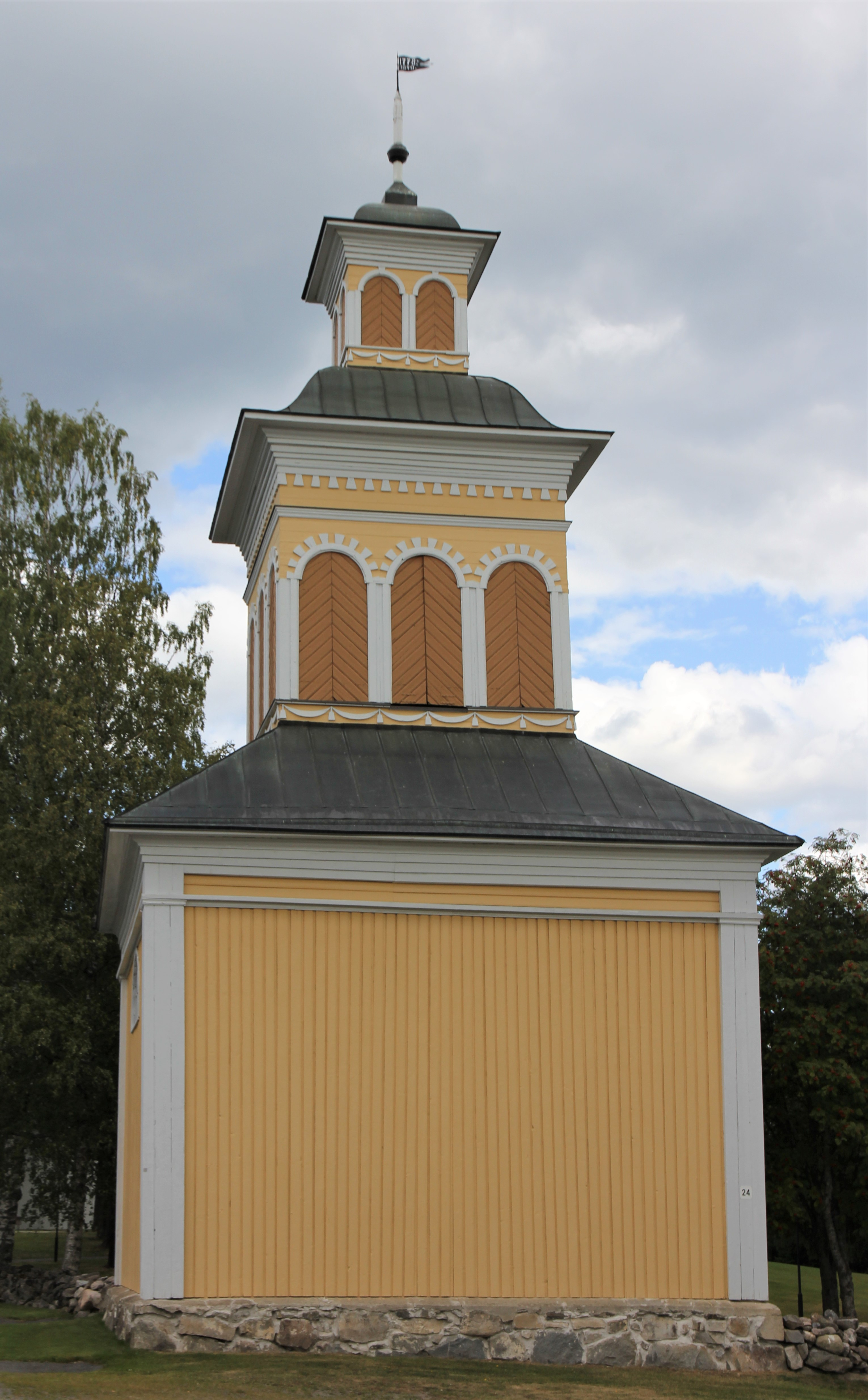 Kaavin kirkon kellotapuli on alkujaan Kaavin toisen kirkon yhteyteen vuonna 1772 valmistunut kellotapuli. Se on siirretty nykypaikalleen vuonna 1815. Se sijaitsee Kaavin kirkon läheisyydessä osoitteessa Kaavintie 24, Kaavi.